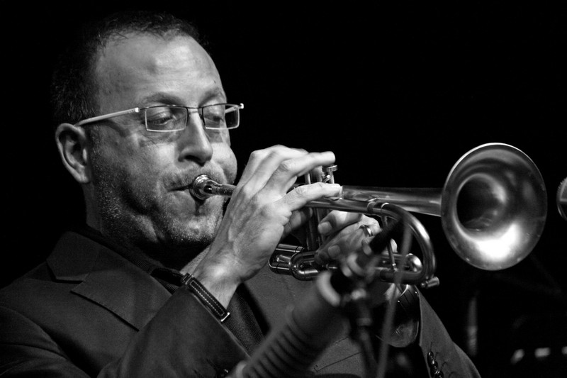 Ernie Hammes in Saarwellingen 2010